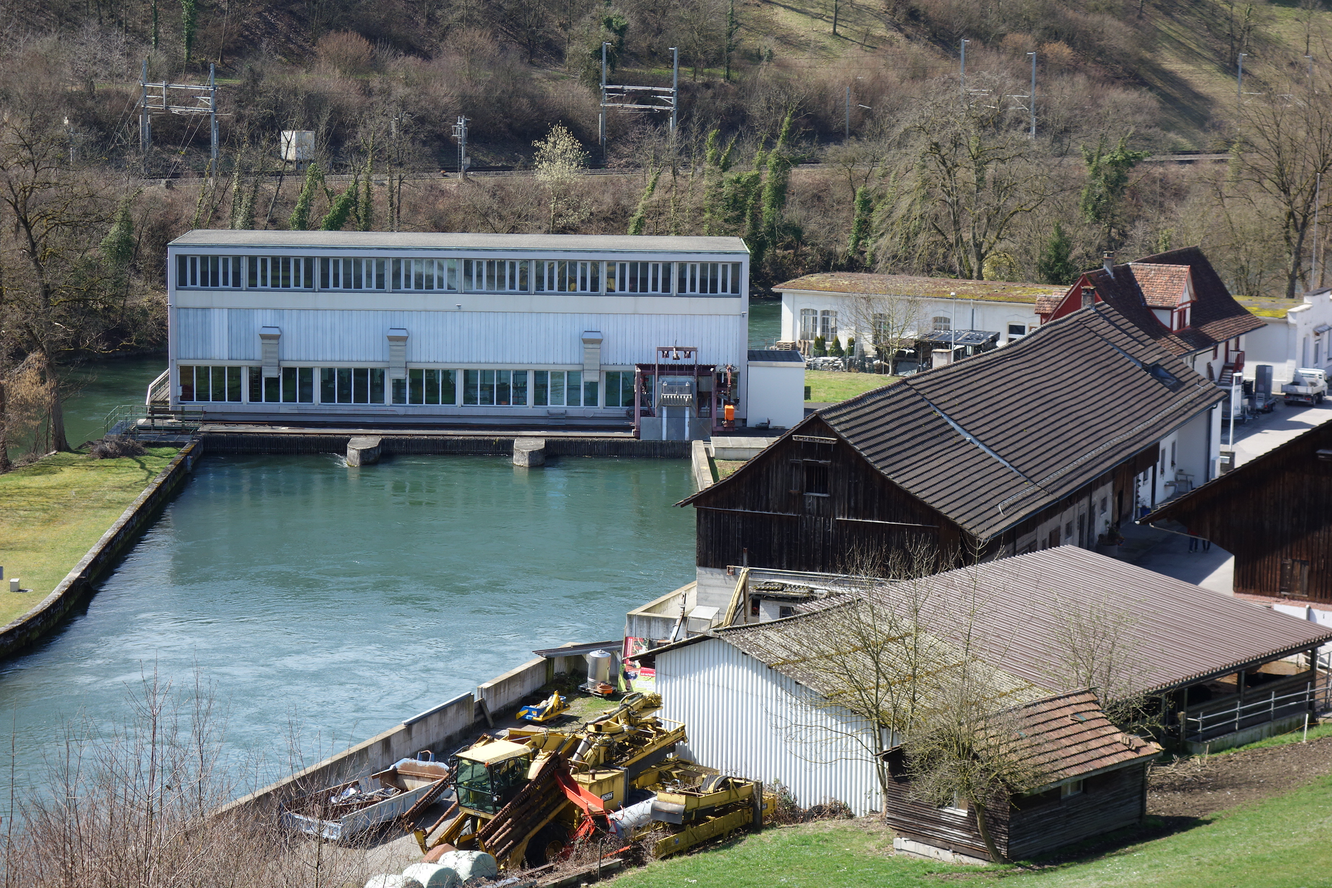 Kraftwerk Schiffmühle, Untersiggenthal AG, Schweiz